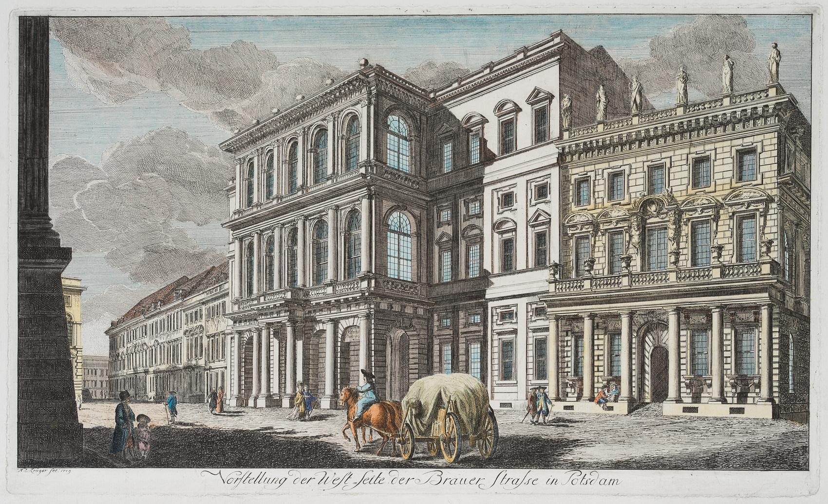 Palast Barberini in Potsdam, 24,6 x 43 cm